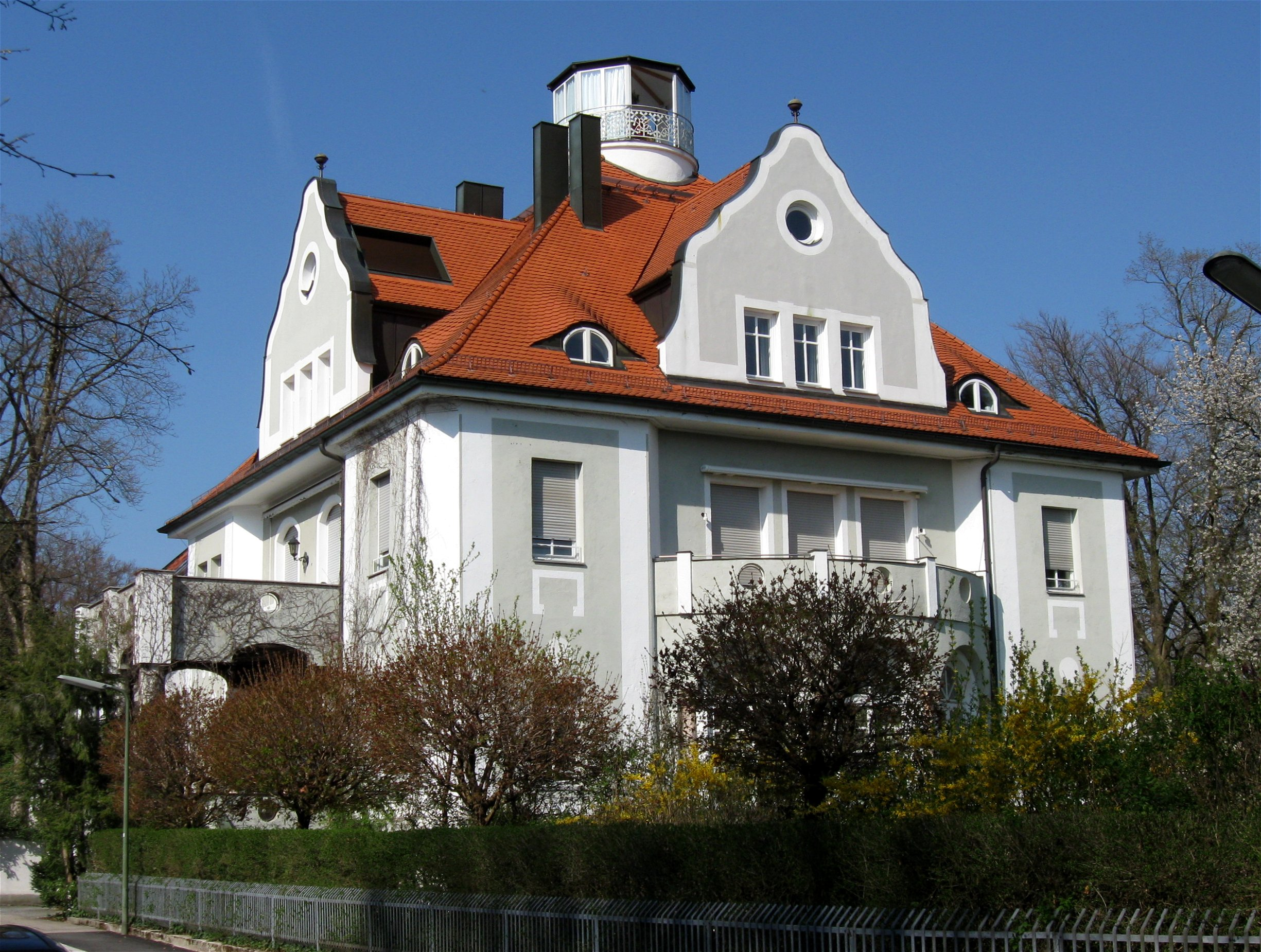 Pössenbacher Straße 21; Villa, neubarock, mit Belvedere, 1906-07 von Max Ostenrieder; mit Pergolatürmchen, Remise und Gittertor an der Paulastraße; München